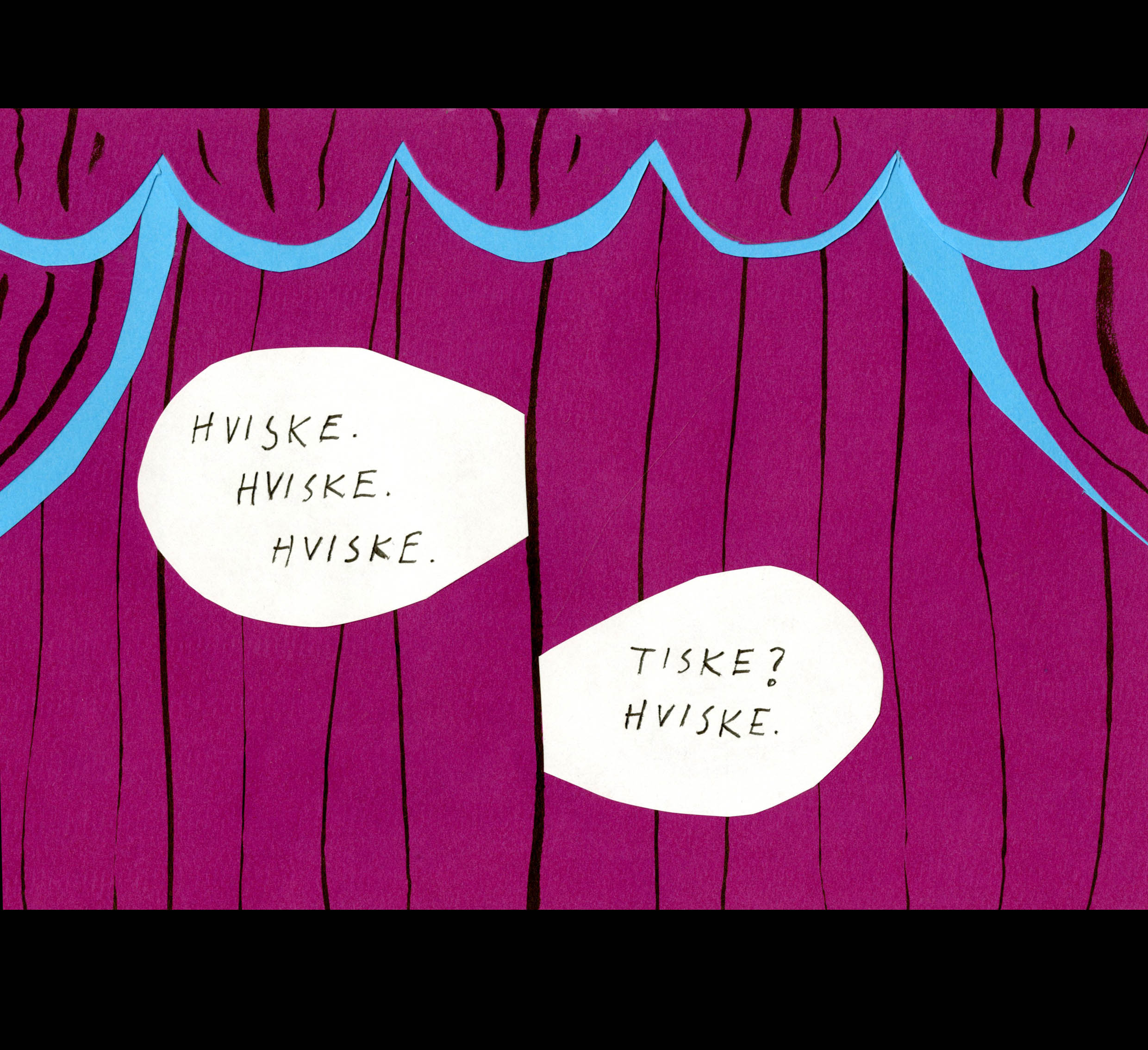 En illustrasjon til Lobbyvirksomhet